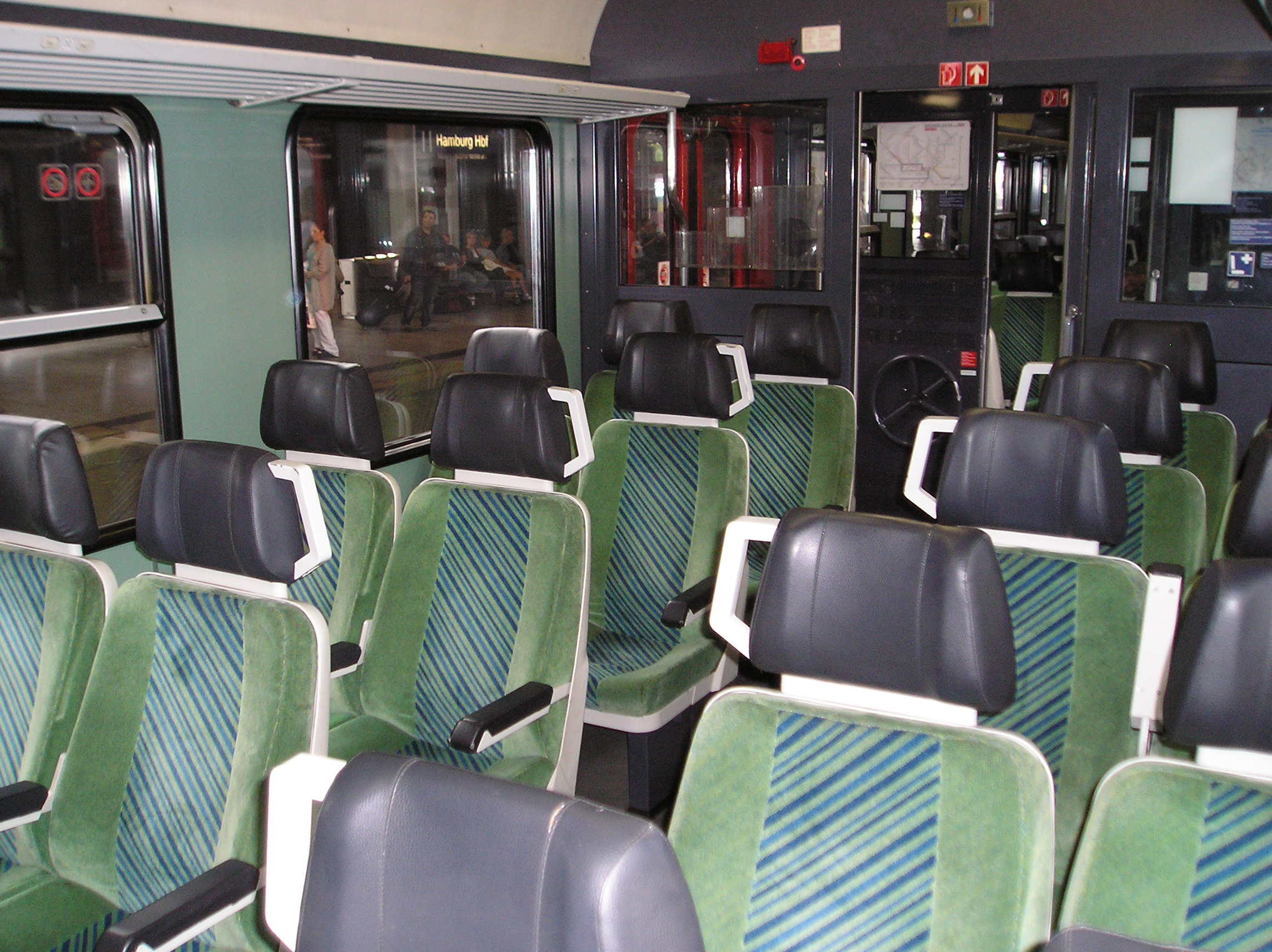 Inneneinrichtung eines Bnrz 446.0 im Design OFV-Schleswig-Holstein